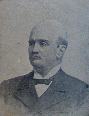 El abogado José María Rosa (p.), Ministro de Hacienda (1898-1900) durante la primera etapa de la segunda presidencia de Julio Argentino Roca (1898-1904)